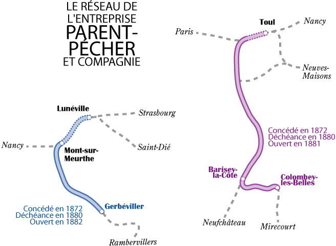 Carte du réseau meurthe-et-mosellan concédé à l'entreprise Parent-Pécher et Cie (1872-1880), dessinée par moi-même pour l'article éponyme.